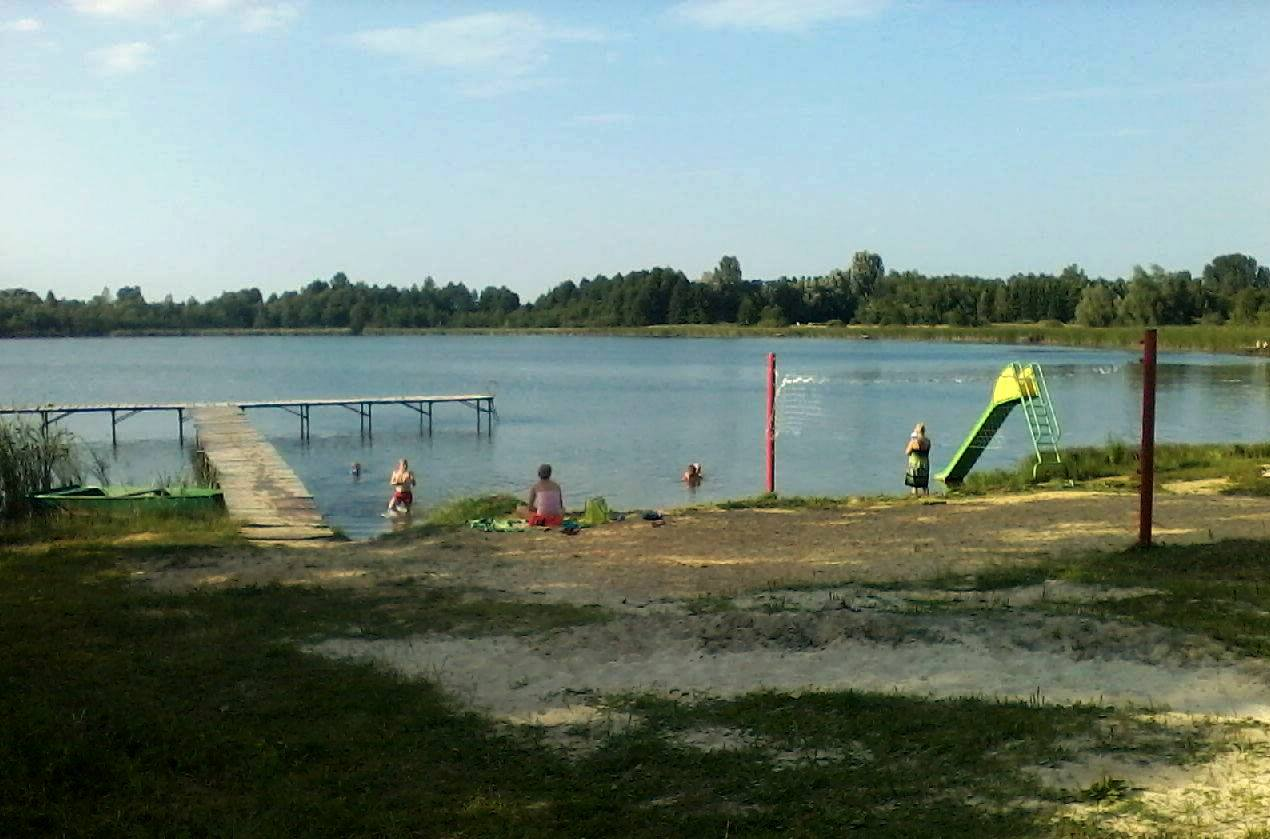 widok z plaży